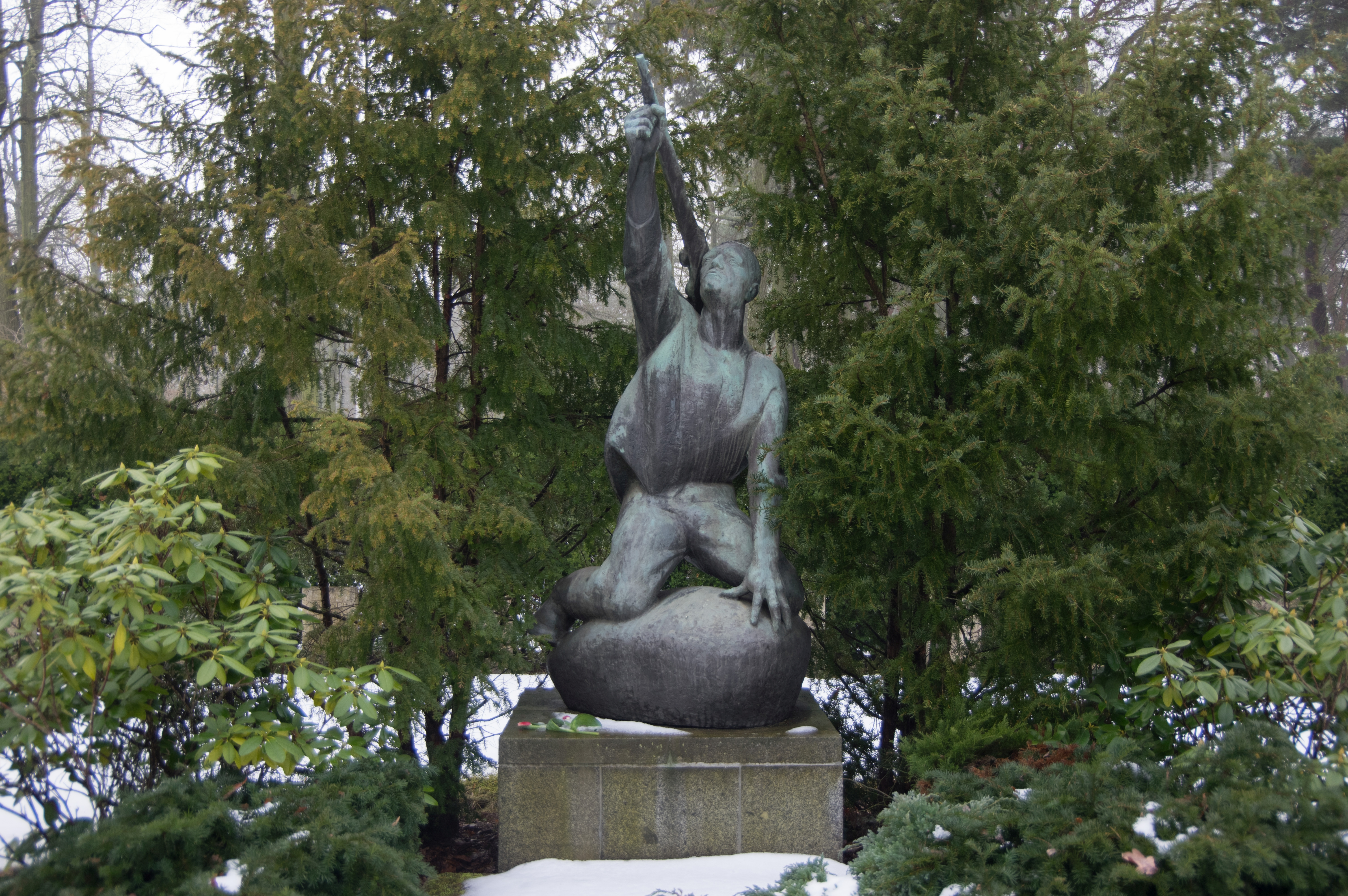 Berlin-Adlershof. Der Friedhof Adlershof befindet sich in dem Bezirk Treptow-Köpenick.